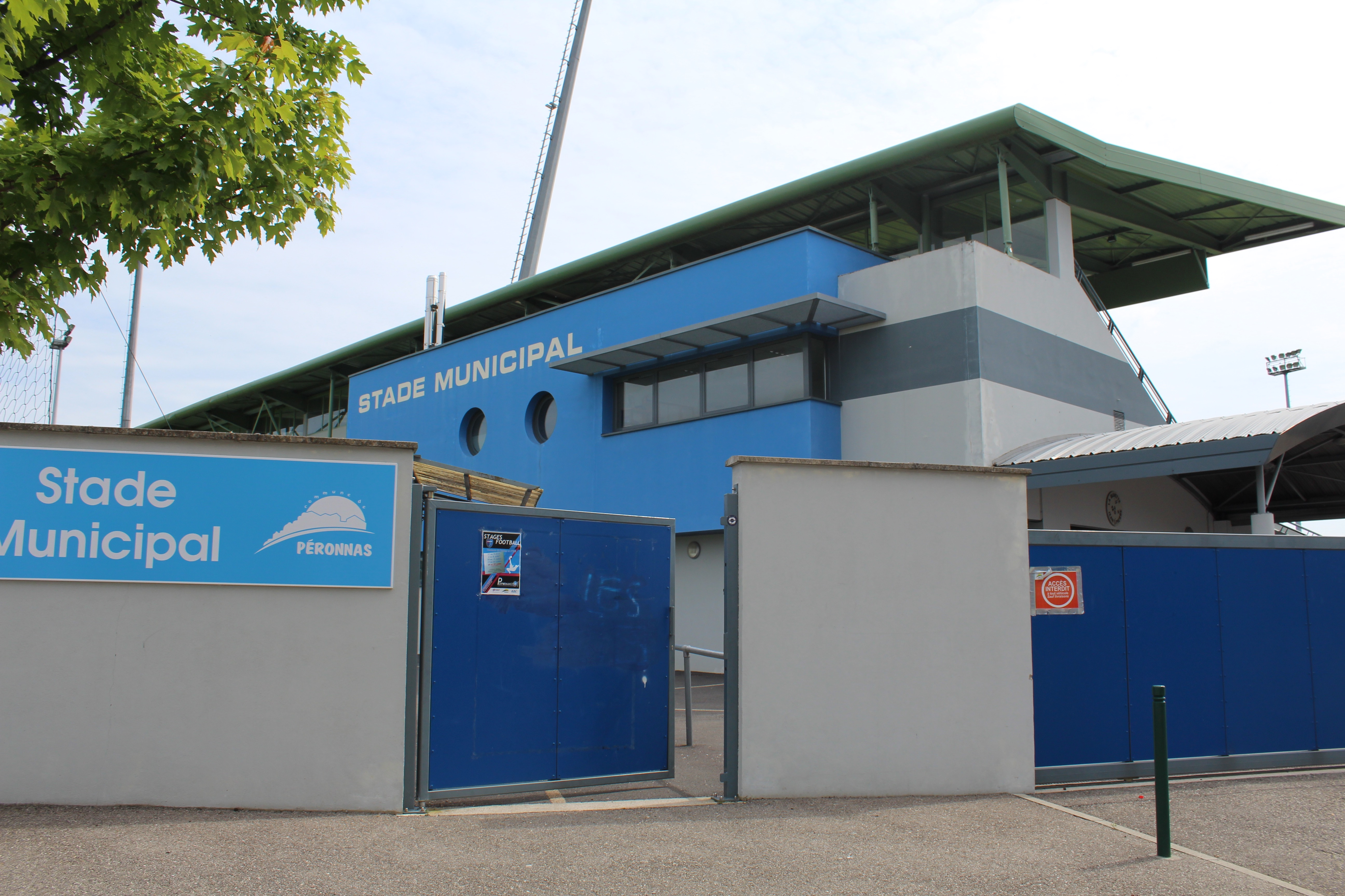 Tribune ouest du stade municipal de Péronnas.